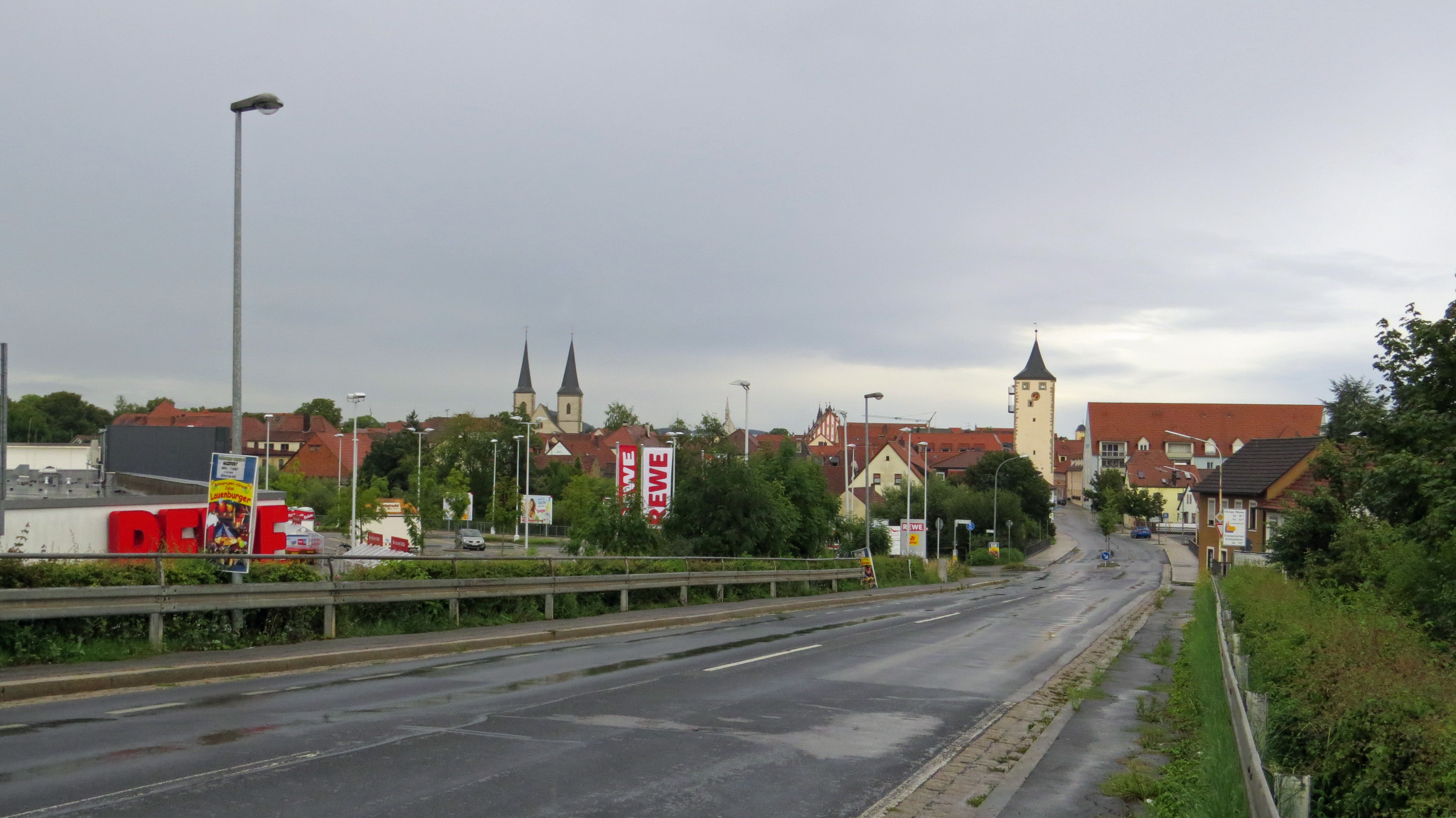 Haßfurt - Altstadt von Westen